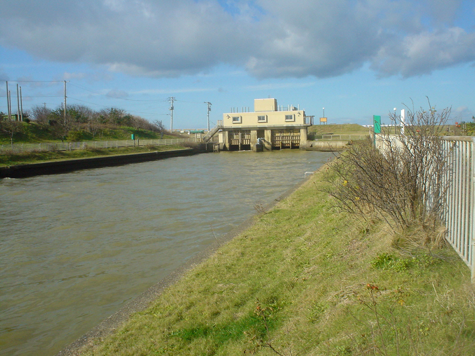 Shinbori River in Niigata, Japan. ja: 新堀川（新潟県上越市大潟区。河口方向撮影。）